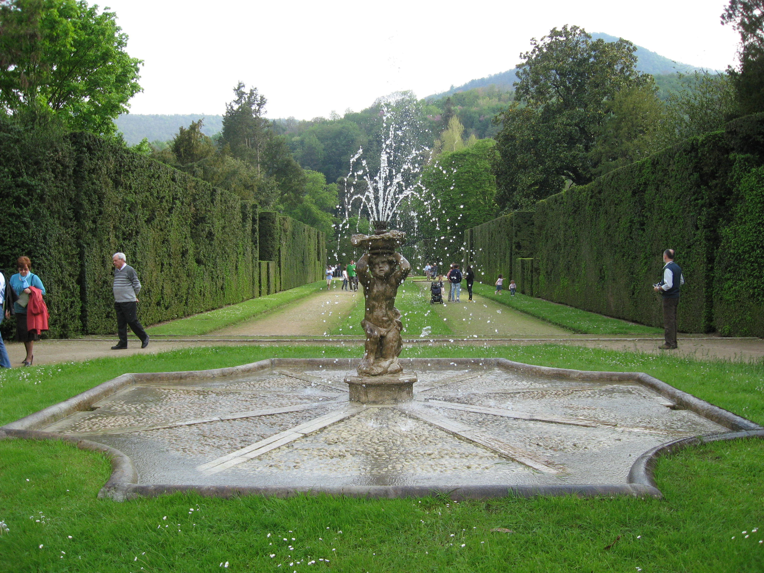 La Fontana della Pila nel giardino di Villa Barbarigo a Valsanzibio